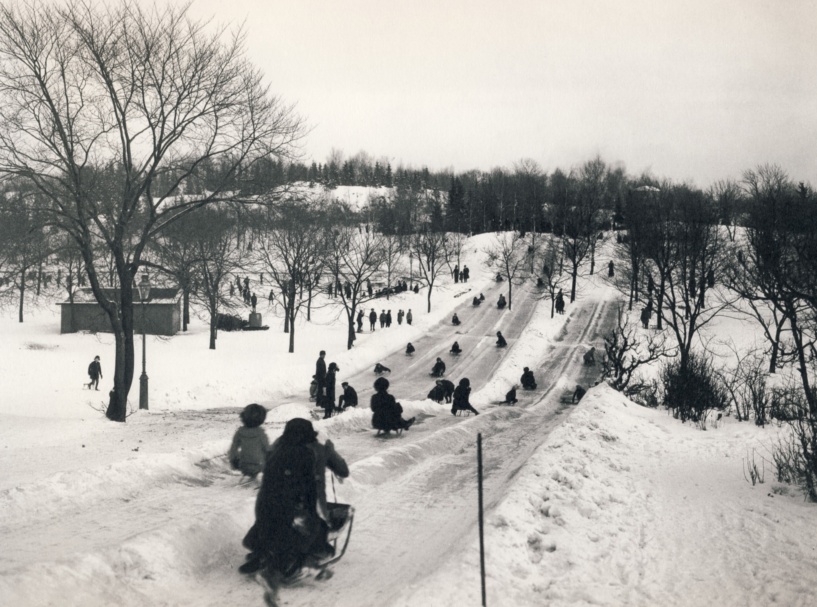 Barn och vuxna åker kälke i Tantolunden, Stockholm (vintern 1917)